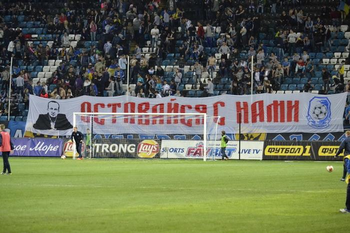 Банер на матчі одеського Чорноморця та київського Динамо на фан-секторі господарів із текстом: "Залишайся з нами", присвячений головному тренеру команди, Роману Григорчуку.